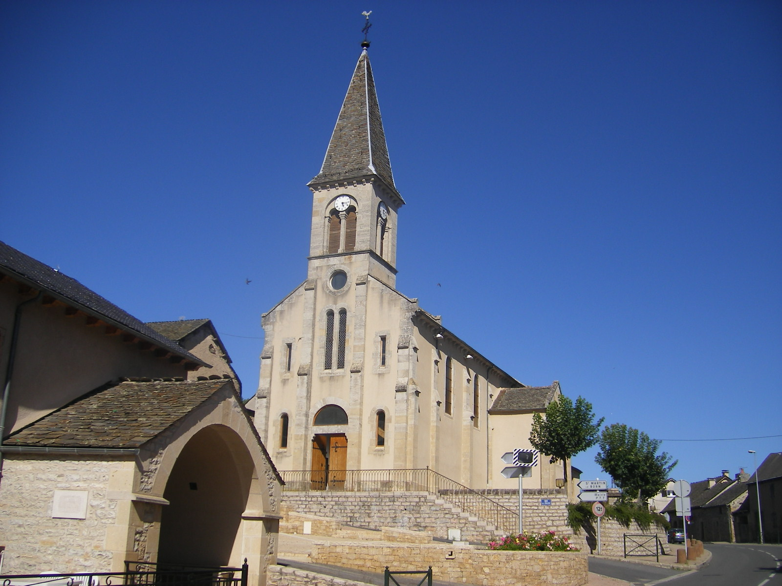 Badaroux